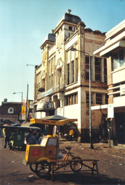 Deze foto toont het straatbeeld in Soerabaja, de hoofdstad van Oost Java, Indonesië. Op de voorgrond staan verrijdbare winkeltjes, die overal in het straatbeeld van Surabaya terug komen. Op de achtergrond staat een gebouw dat herinnert aan de koloniale tijd.